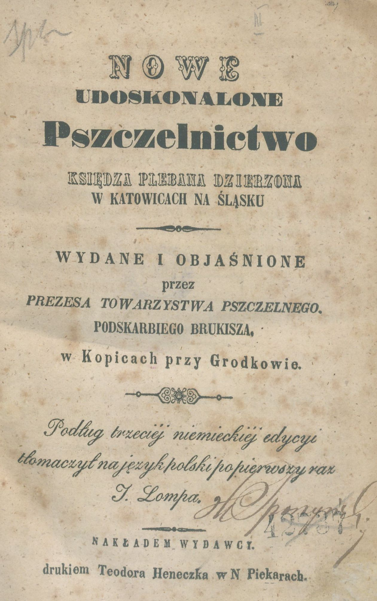 Karta tytułowa druku Nowe udoskonalone pszczelnictwo autorstwa Jana Dzierżonia z 1852 r.